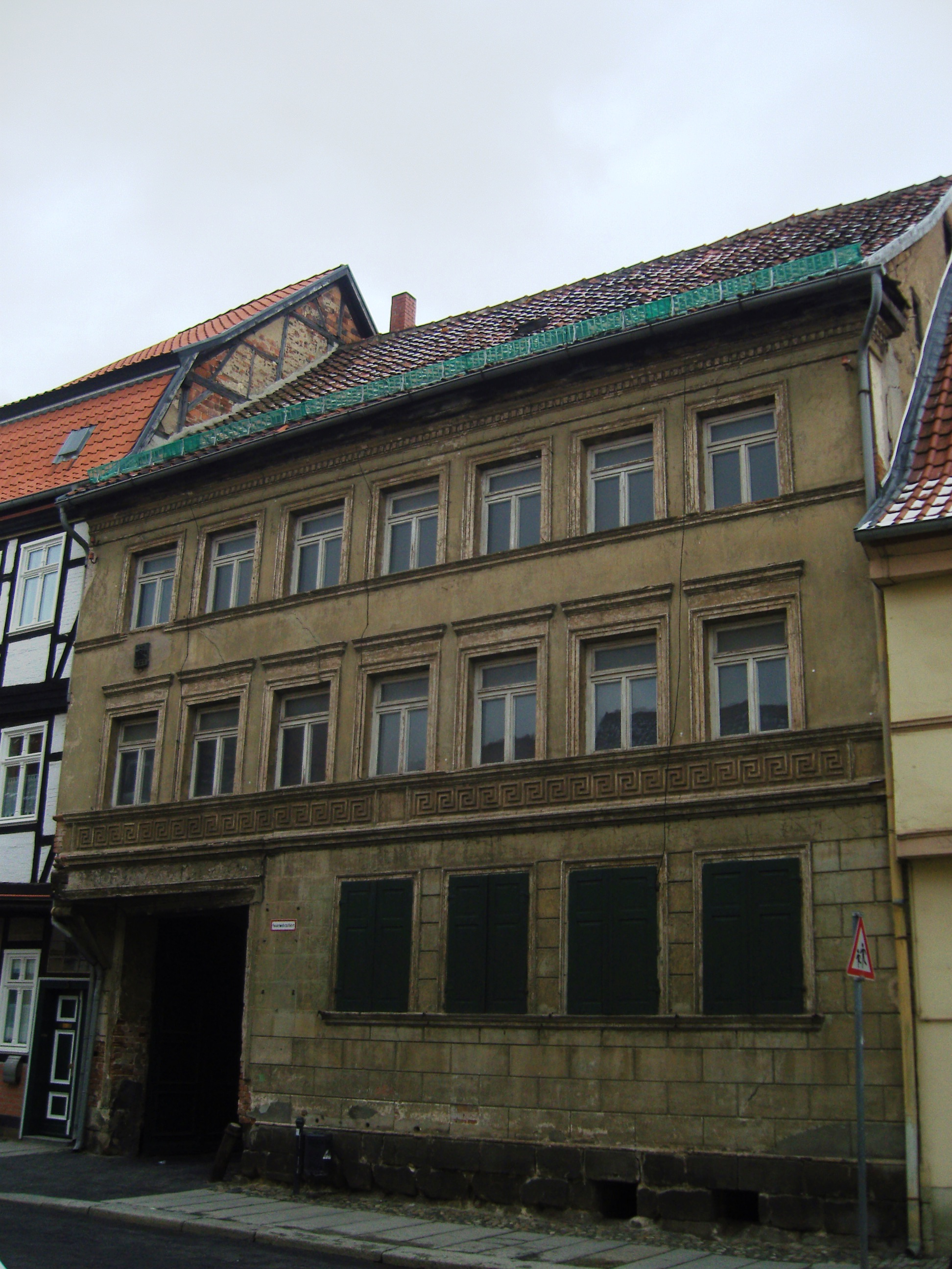 Wohnhaus in der Weberstraße 6 in Quedlinburg